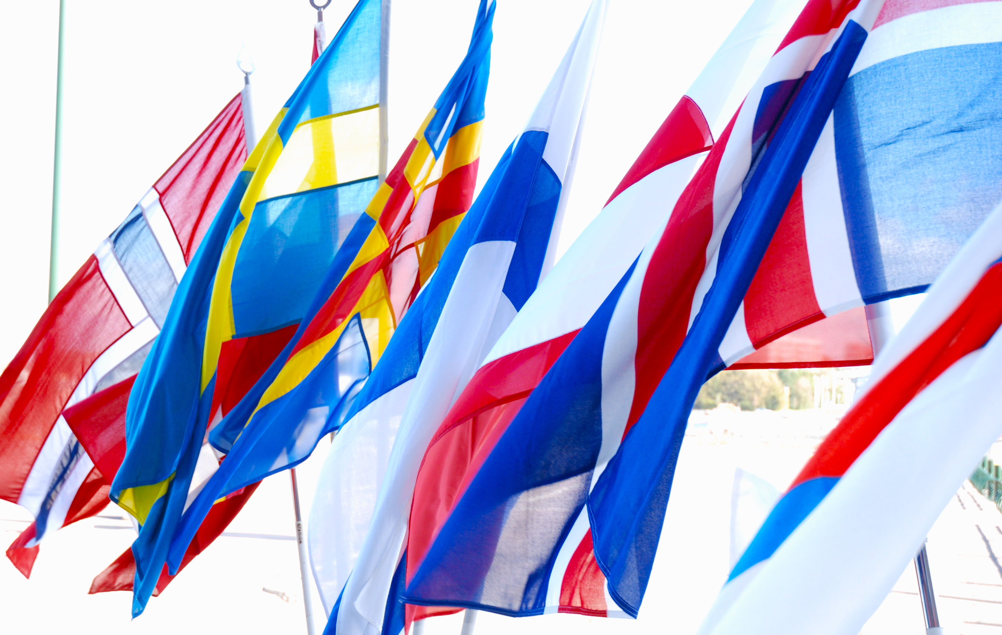 Nordiske flag